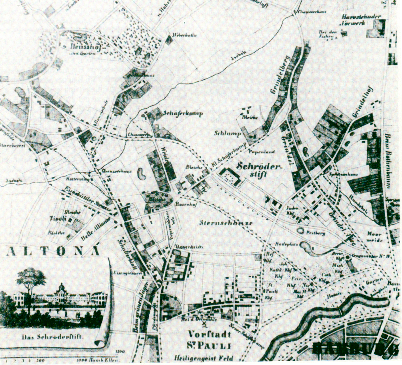 karte: Das Schröderstift und dessen nächste Umgebung. Entworfen und gezeichnet von Johann Schröder, 1853; aus: Projektgruppe Wohnen im Stadtteil: Der Schulterblatt. Ein Viertel verändert sich. Hamburg 1982, S. 11